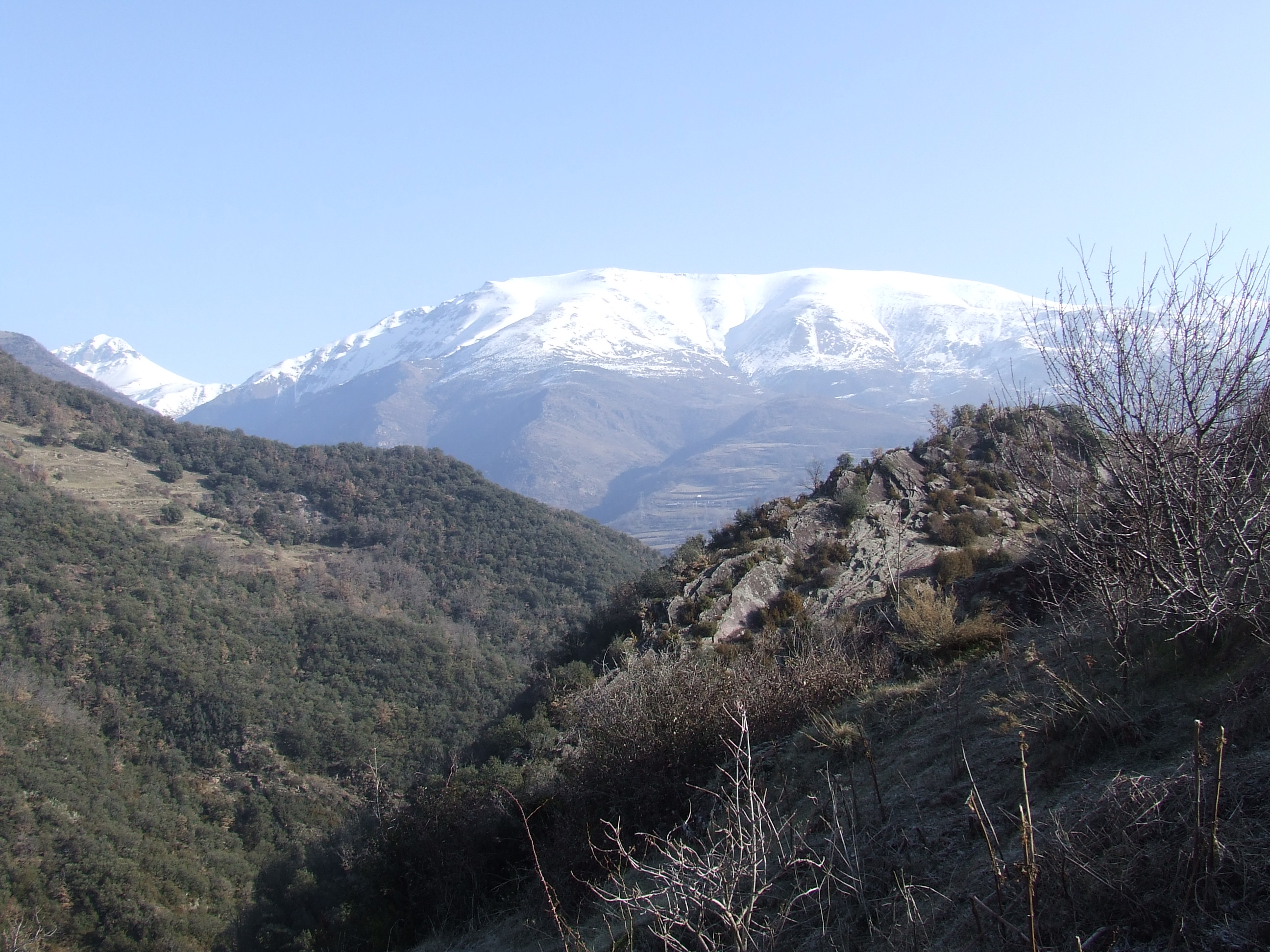 Lo Tossal i el Tuc de la Cometa (la Torre de Cabdella, Pallars Jussà)